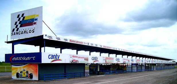 Autódromo Internacional de San Carlos, Cojedes. Una de las mejores pistas de automovilismo en Venezuela..